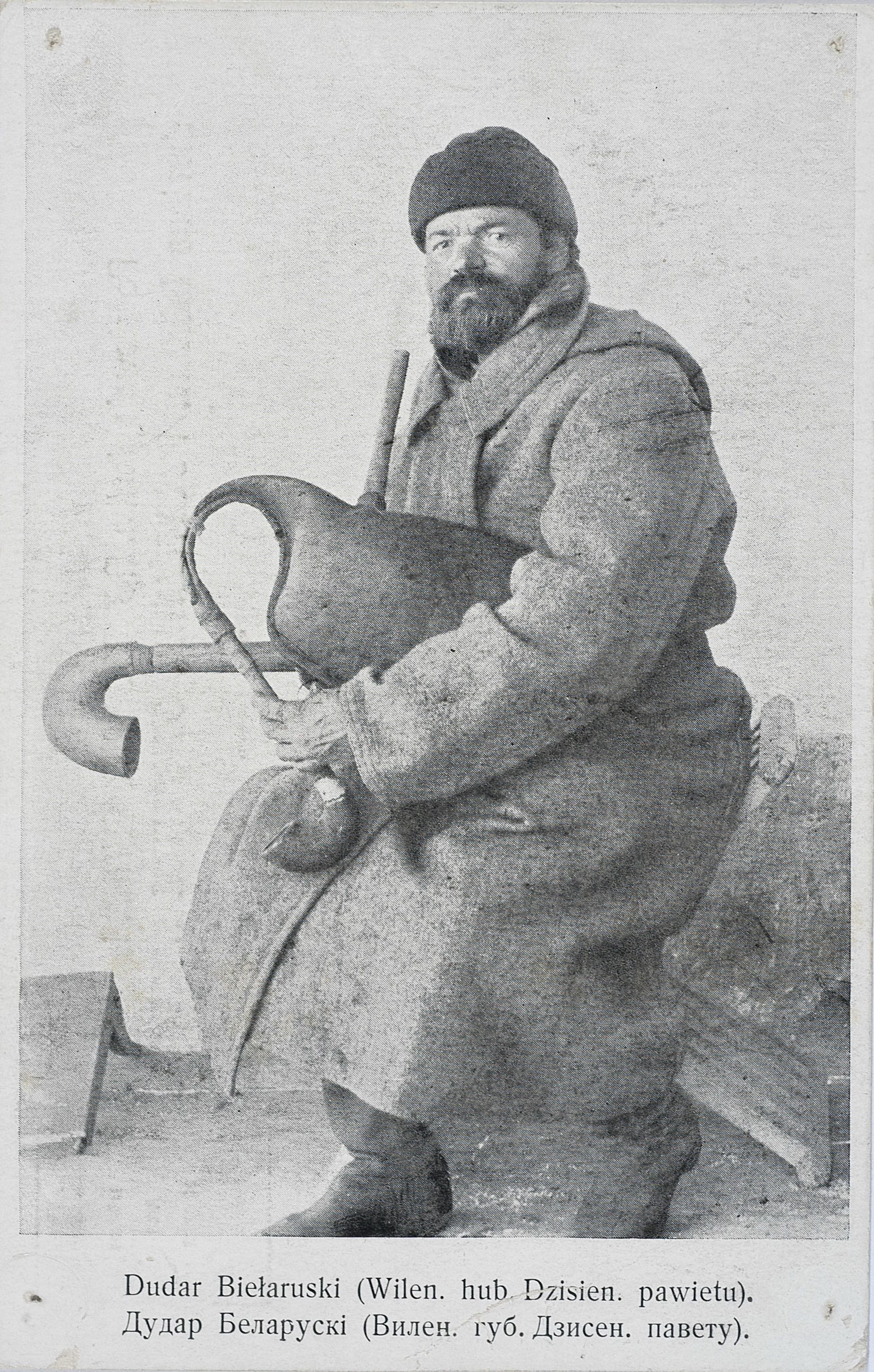 Беларуская (тарашкевіца): Паштоўка Дудар беларускі (Віленская губэрня Дзісенскага павету)